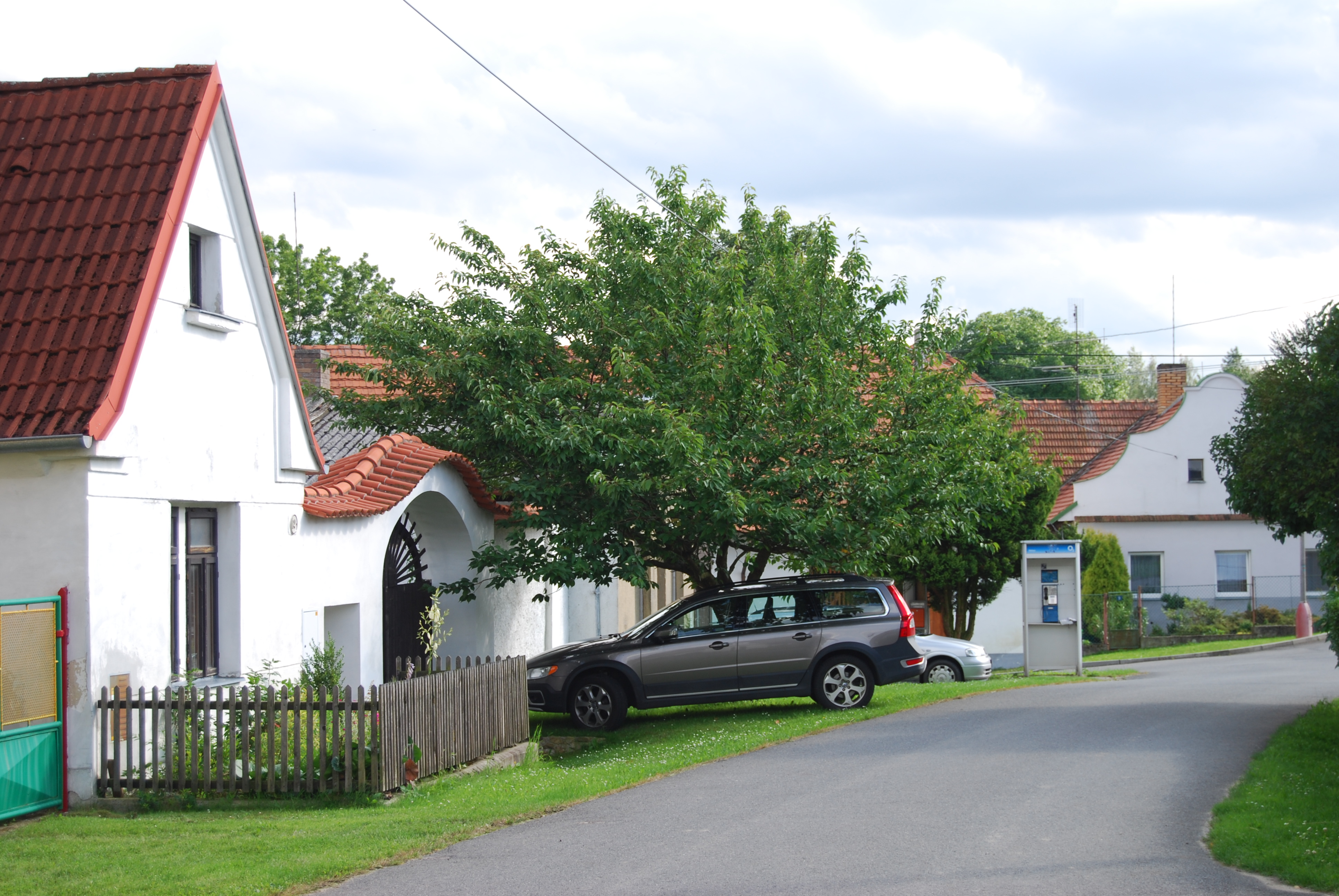 Pohled na část obce. Zběšičky v okrese Písek. Česká republika.